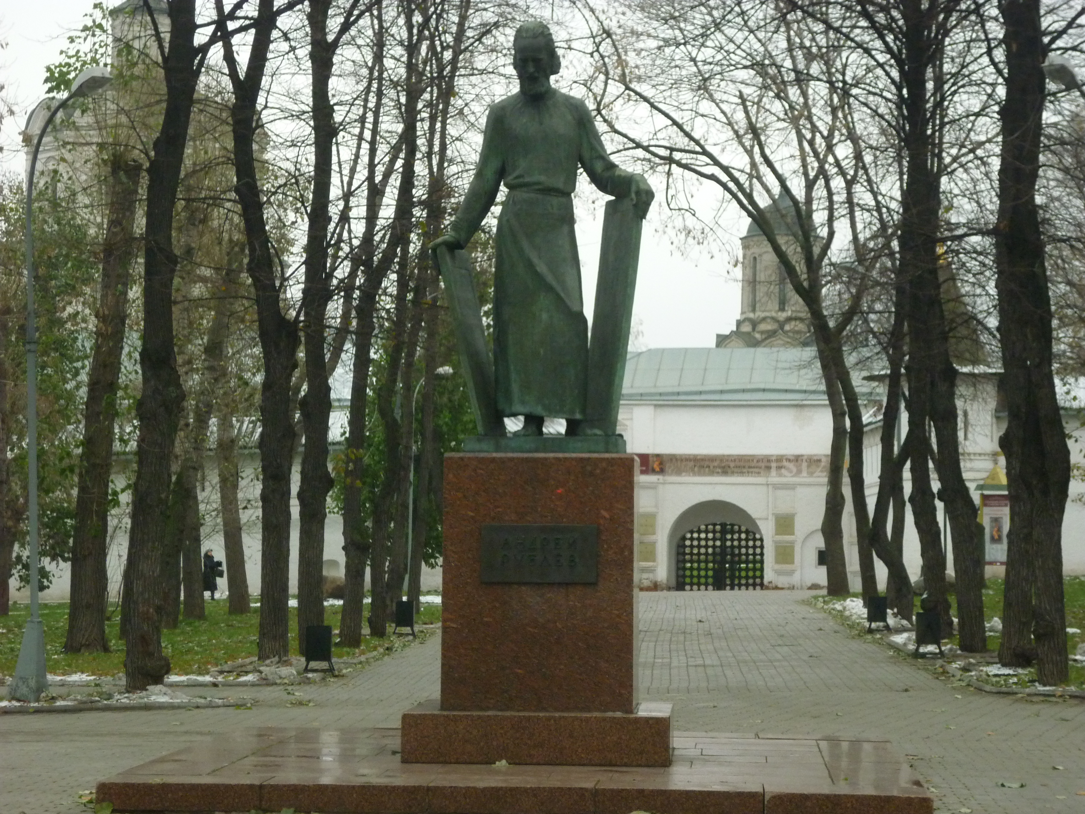 Ансамбль Андроникова монастыря (музей древнерусской культуры и искусства им. А. Рублева) (Москва и Московская область, Москва, Андроньевская площадь, 10)